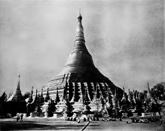 Shwedagon Pagoda, Rangoon